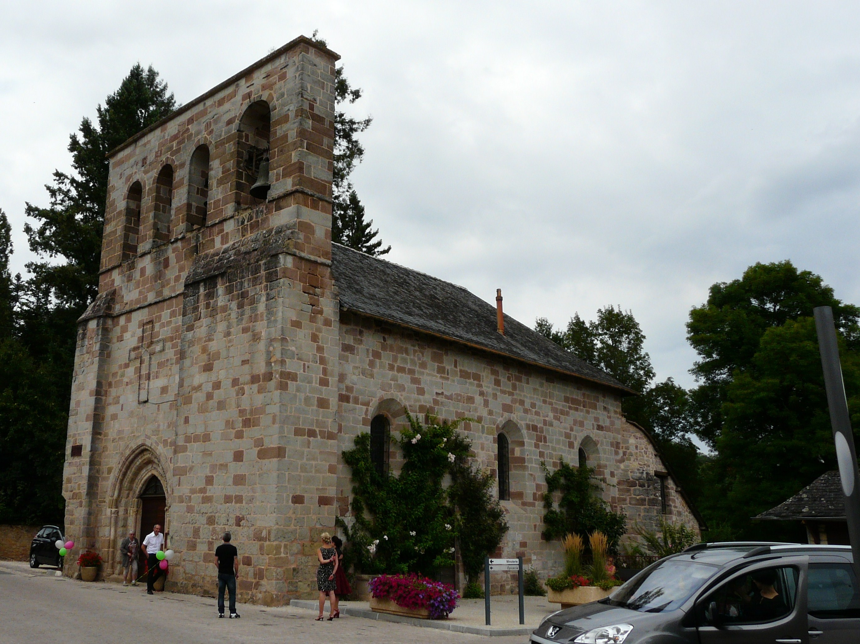 L'église Saint-Pierre-ès-Liens, Brignac-la-Plaine, Corrèze, France.